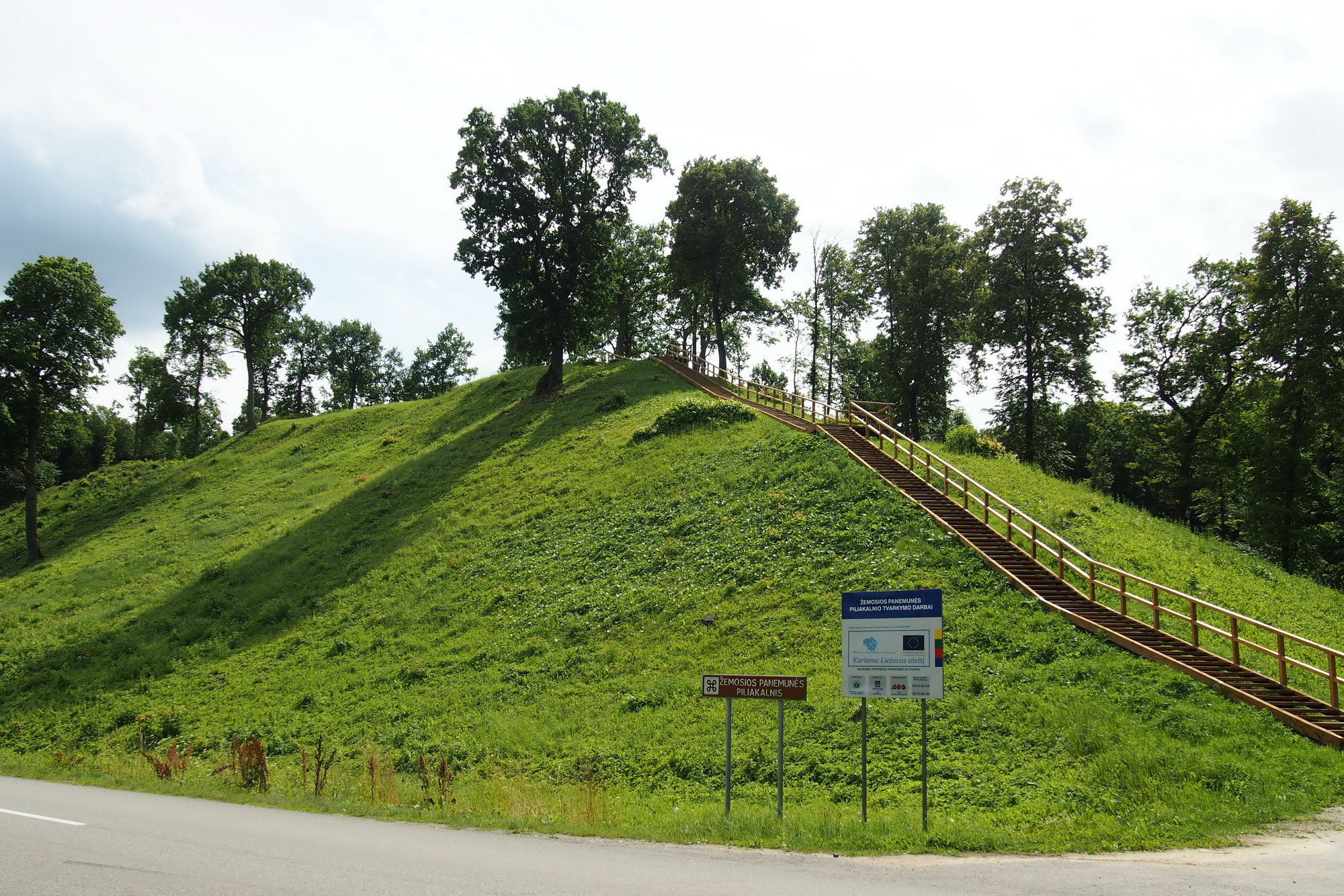 Žemosios Panemunės piliakalnis